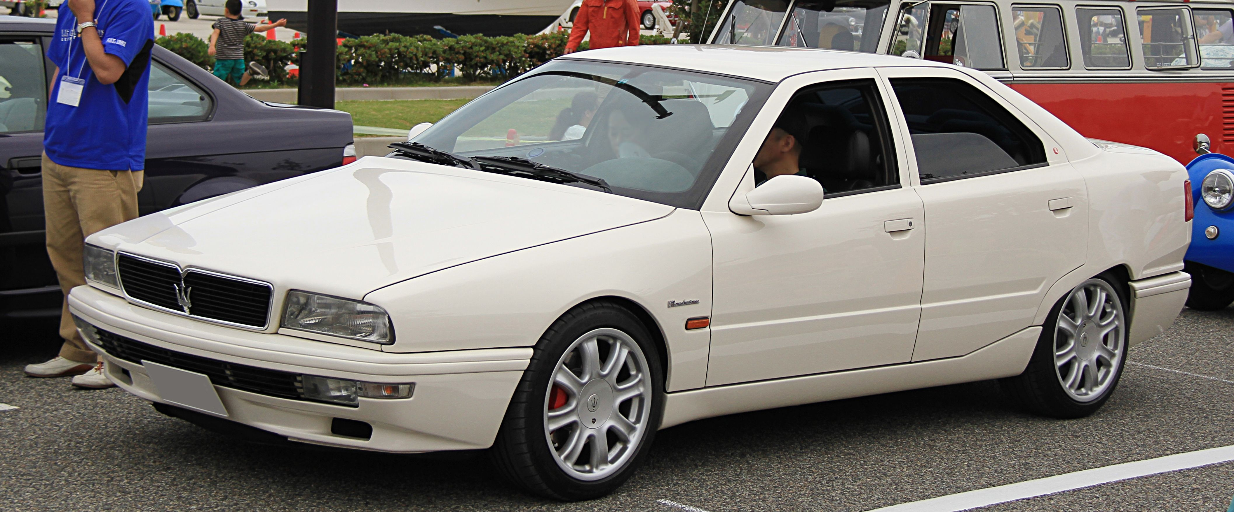 Maserati Quattroporte IV